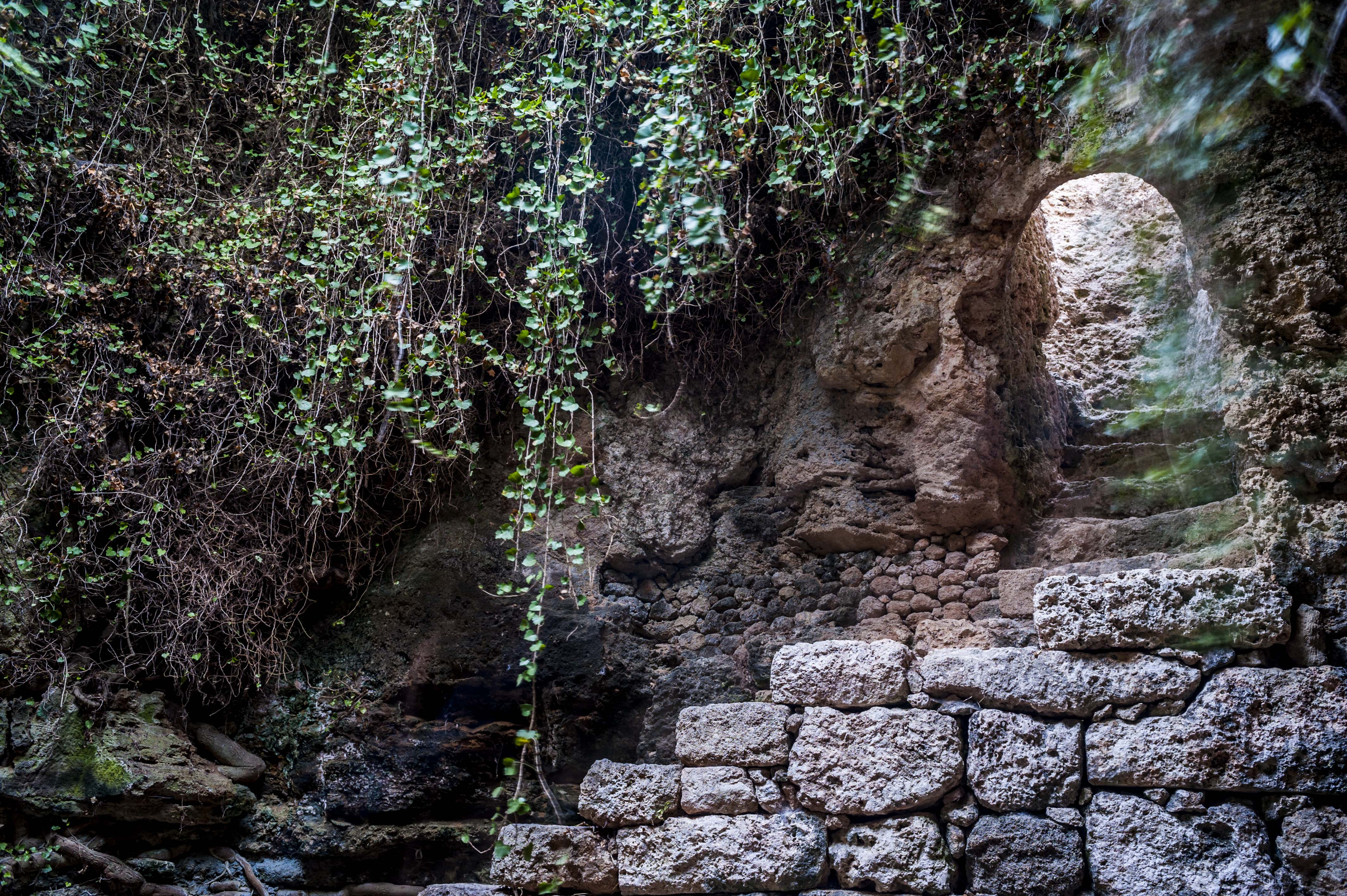 Νυμφαία Ρόδου